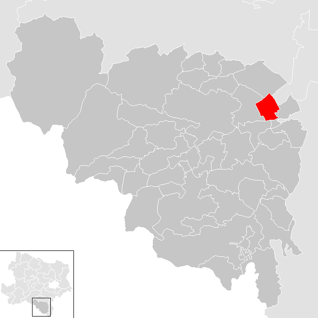 Bezirk Neunkirchen